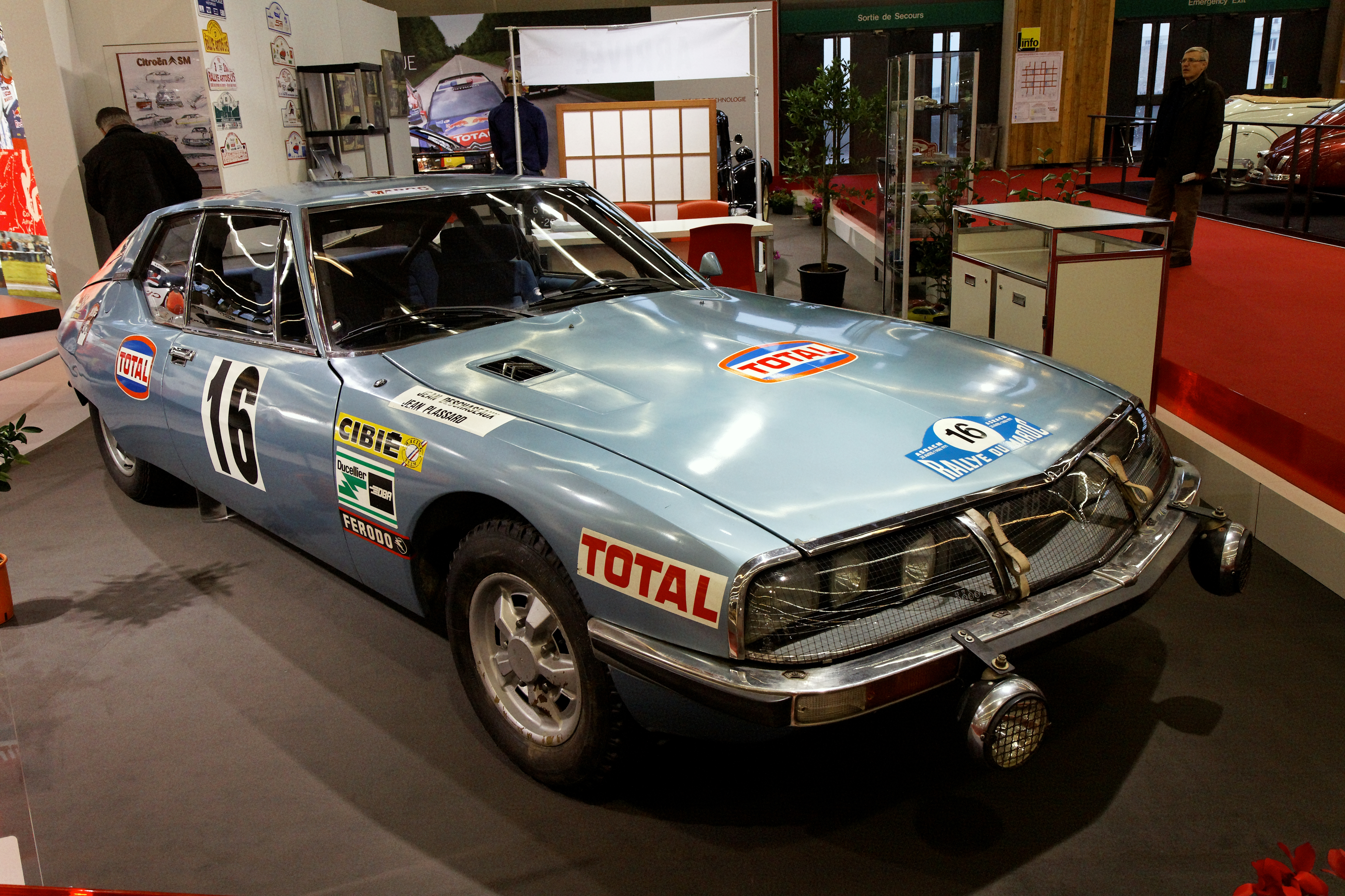 Photographie prise lors du salon rétromobile 2011 à Paris, porte de Versailles.